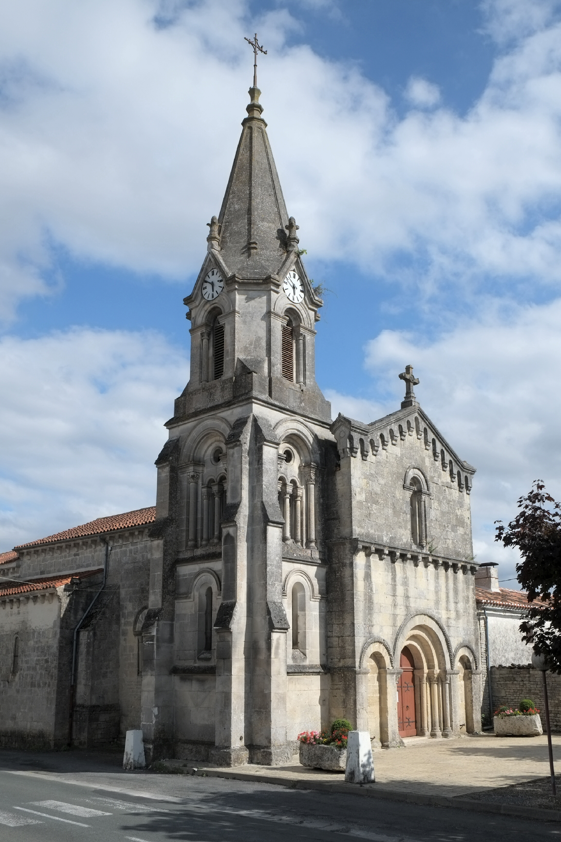 Église Saint-Julien Siecq Charente-Maritime France